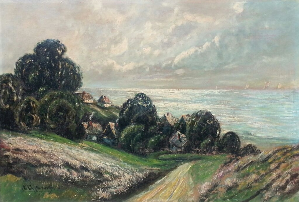 Konrad Alexander Müller-Kurzwelly - Vitt auf Rügen, Öl auf Leinwand, Datierung 1922, 55 x 75 cm